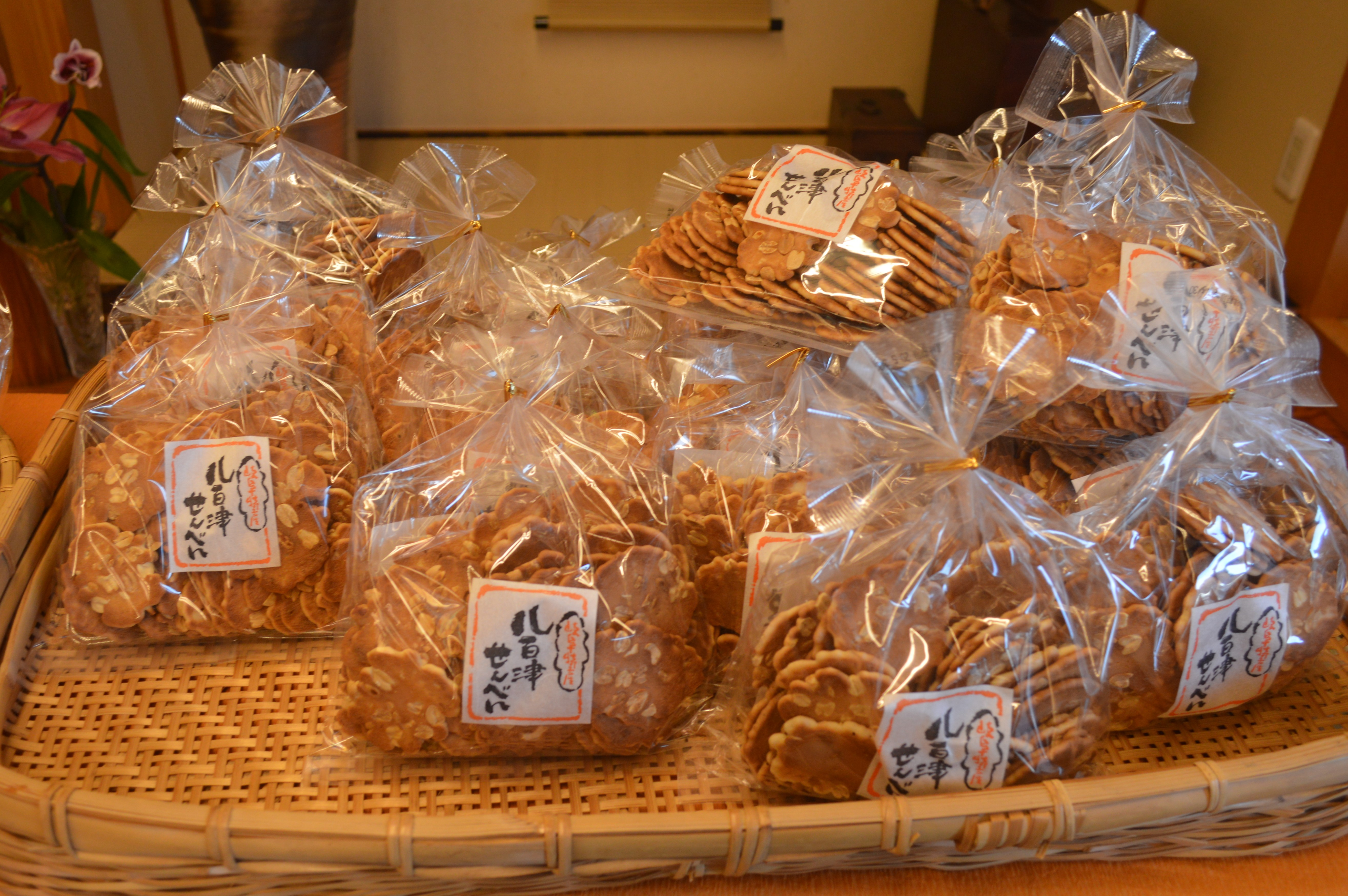 岐阜県加茂郡八百津町の八百津せんべい。